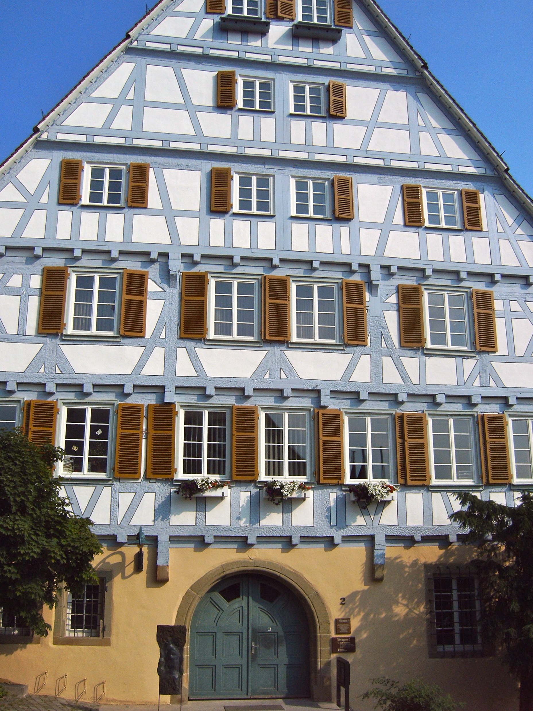 Ehemaliges Oberamtsgebäude Herrenberg